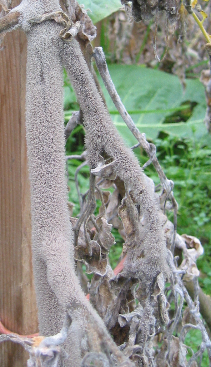 zelfgemaakte foto van Grauwe schimmel op tomaat; eind november